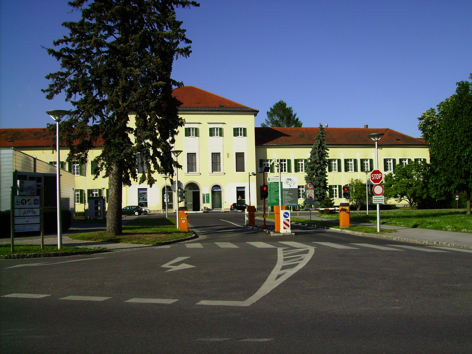 Einfahrtsbereich der Landesnervenklinik Sigmund Freud in Graz